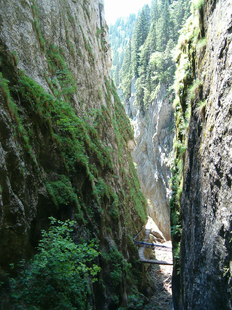 98- Cheile Orzei.jpg